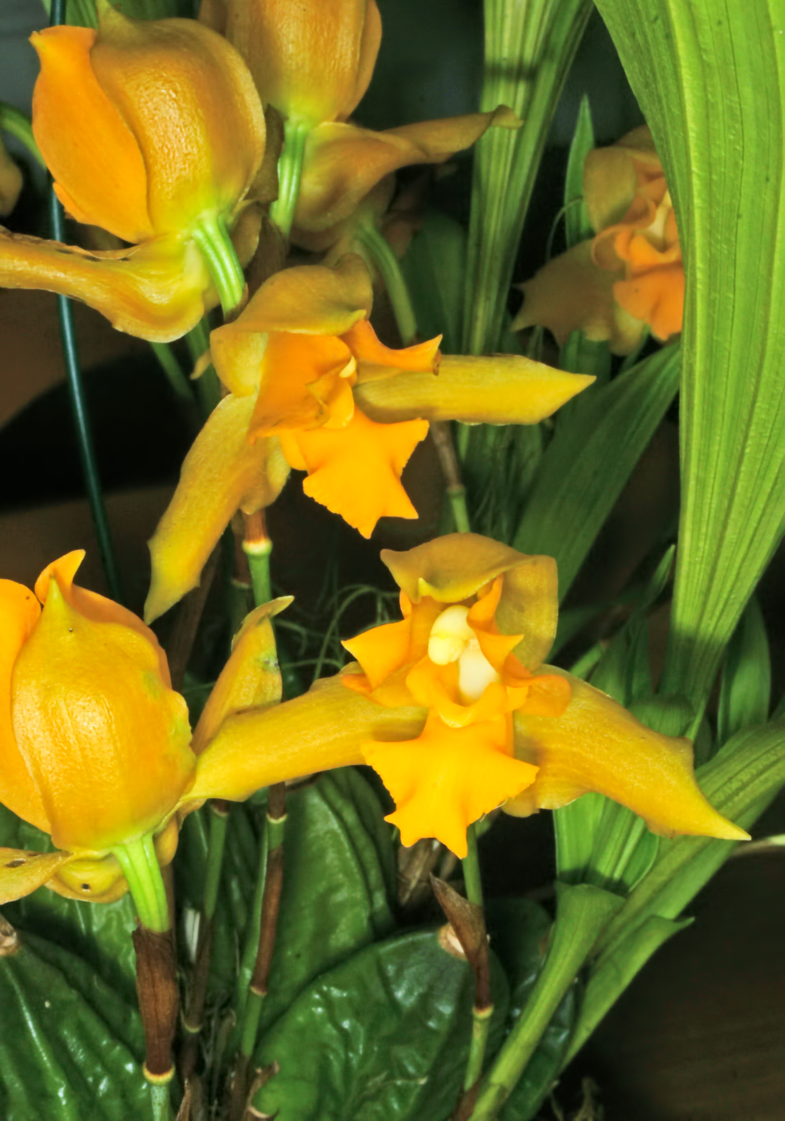 Lycaste consobrina